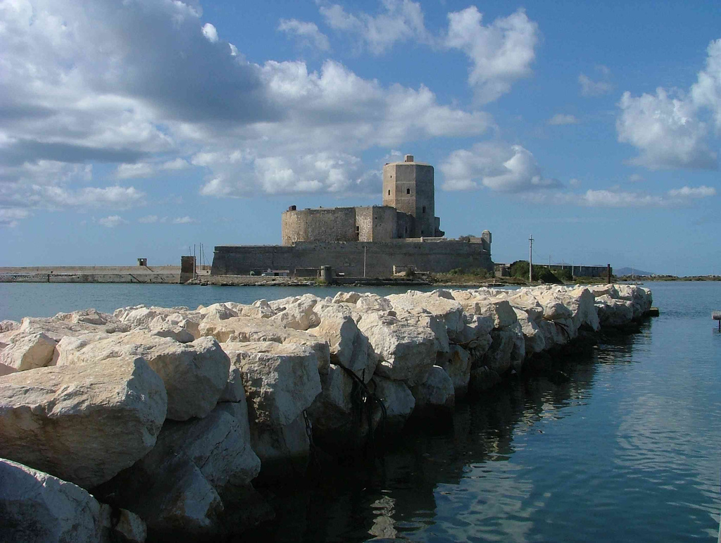 Torre Colombaia, Trapani, Sicilia, Italia